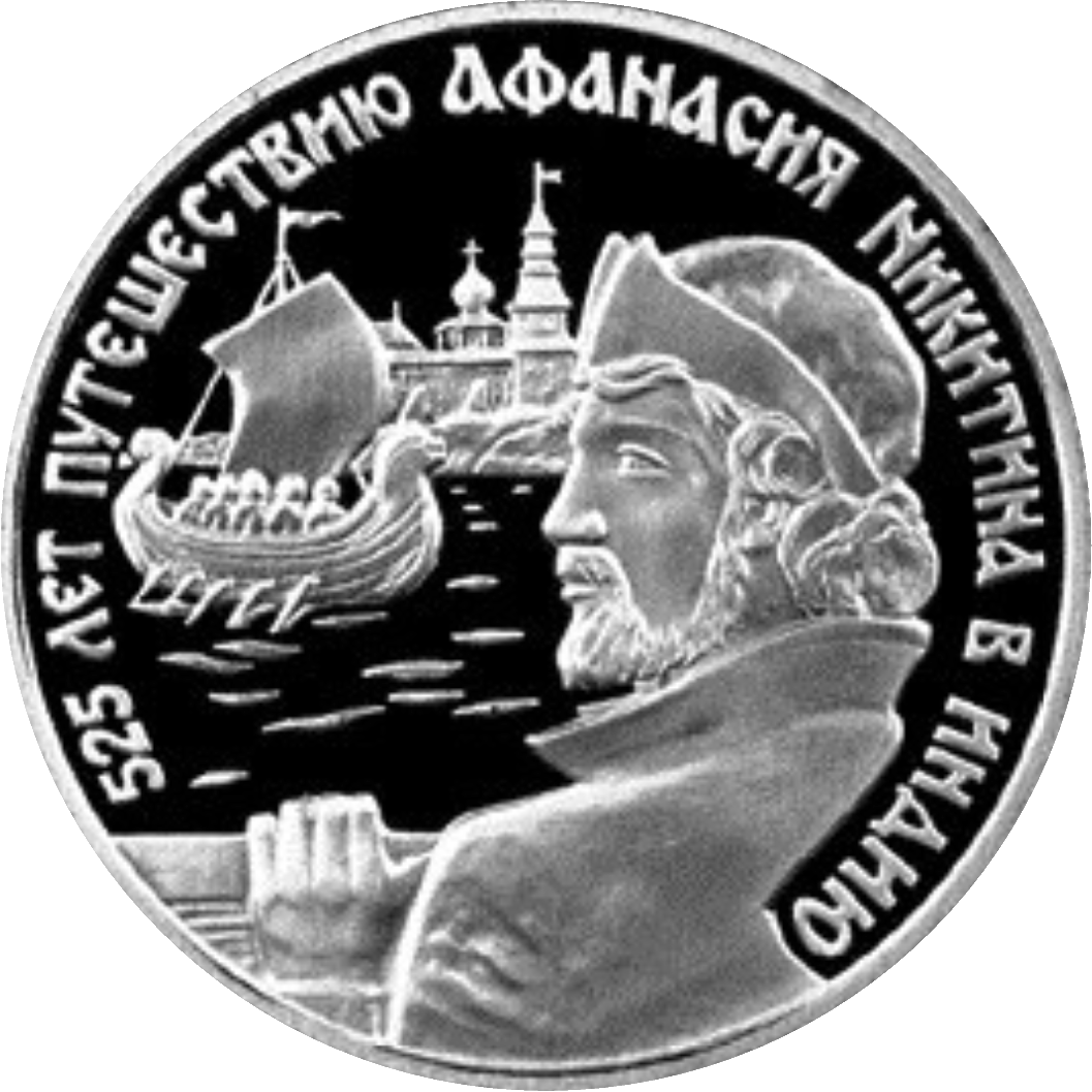 Монета Банка России — Серия: «Выдающиеся личности России», 525 лет путешествию Афанасия Никитина в Индию (1), 2 рубля, реверс.